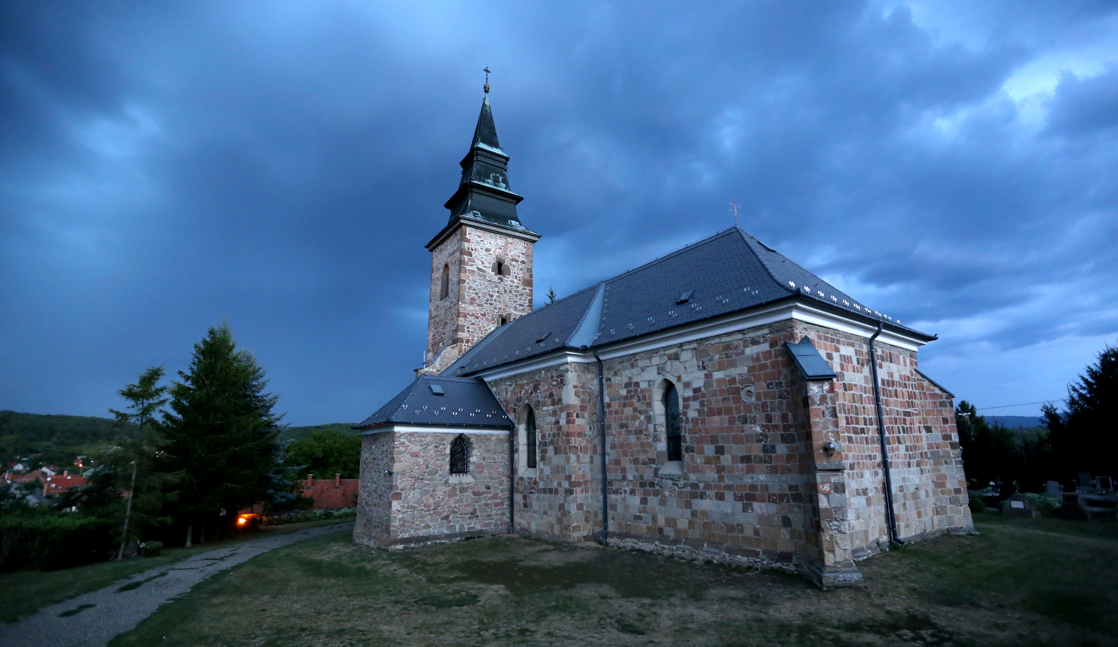 Szent Márton-templom (Bogács)